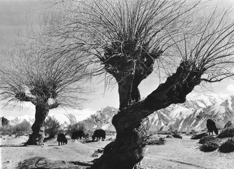 Tibetexpedition, Heilige Weiden Lhasa, drehwüchsige Weiden [heilige Weiden mit starken Torsionen bei Lhasa]